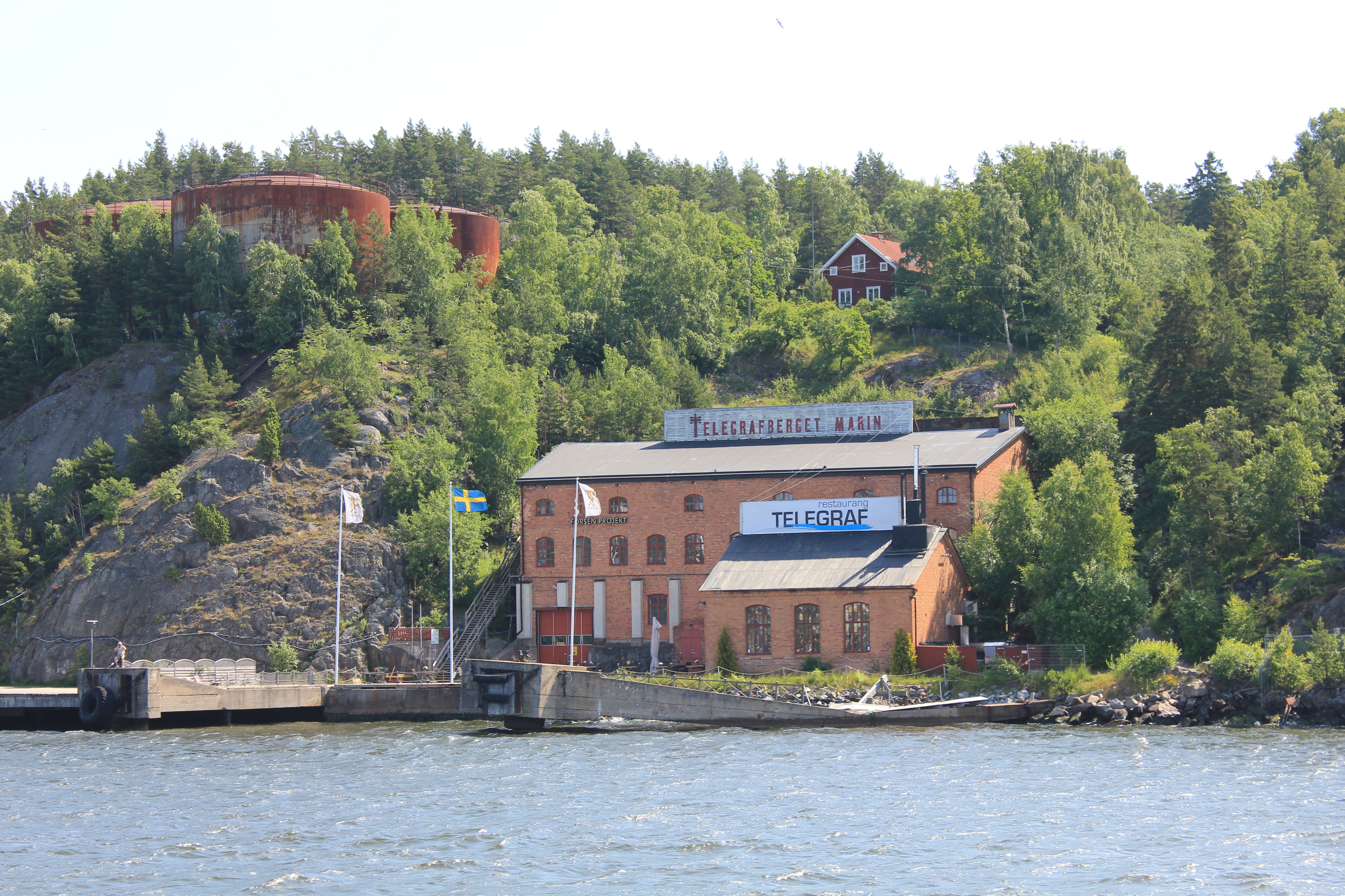 Telegrafberget Marin.